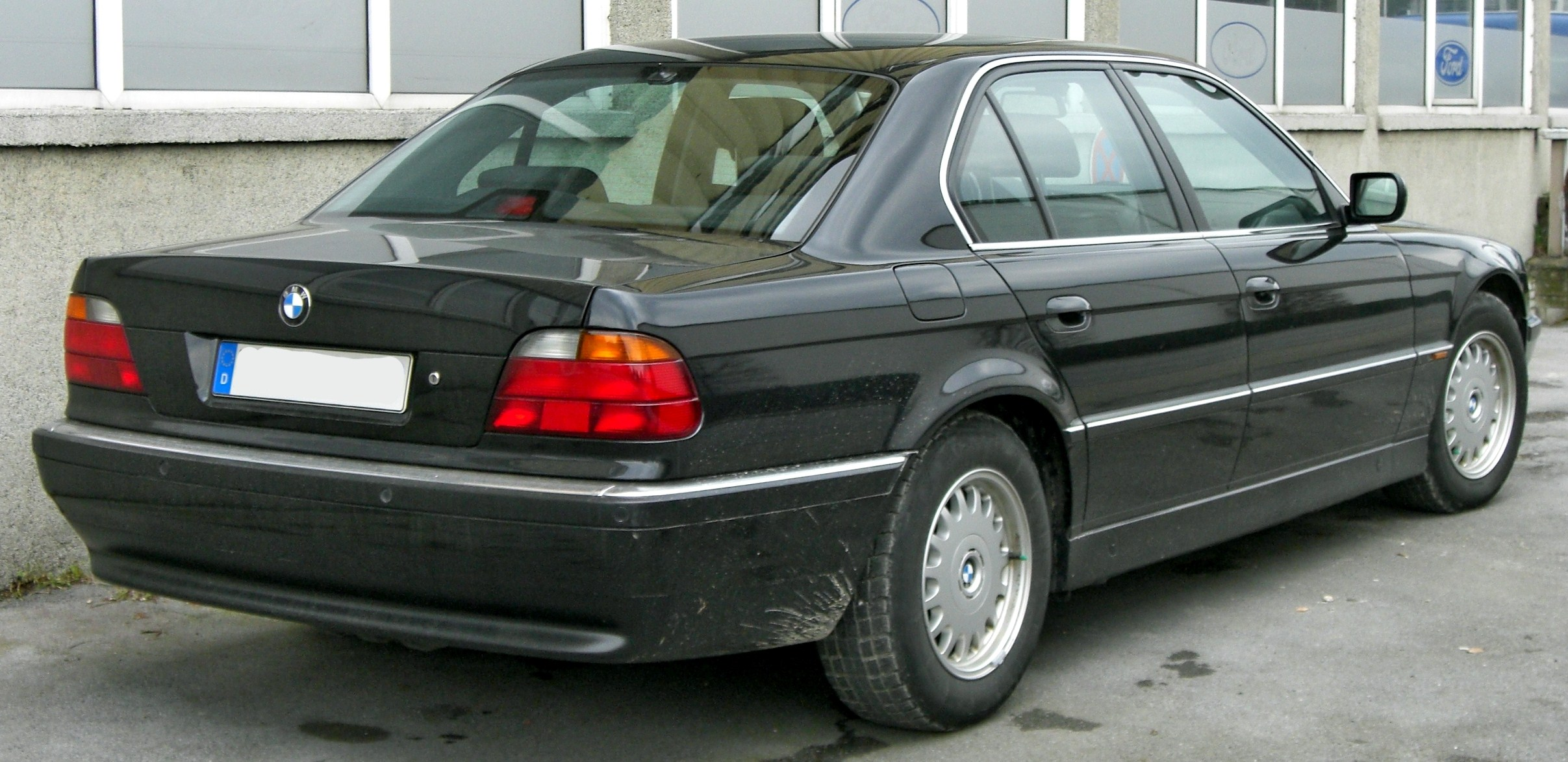 BMW 7er